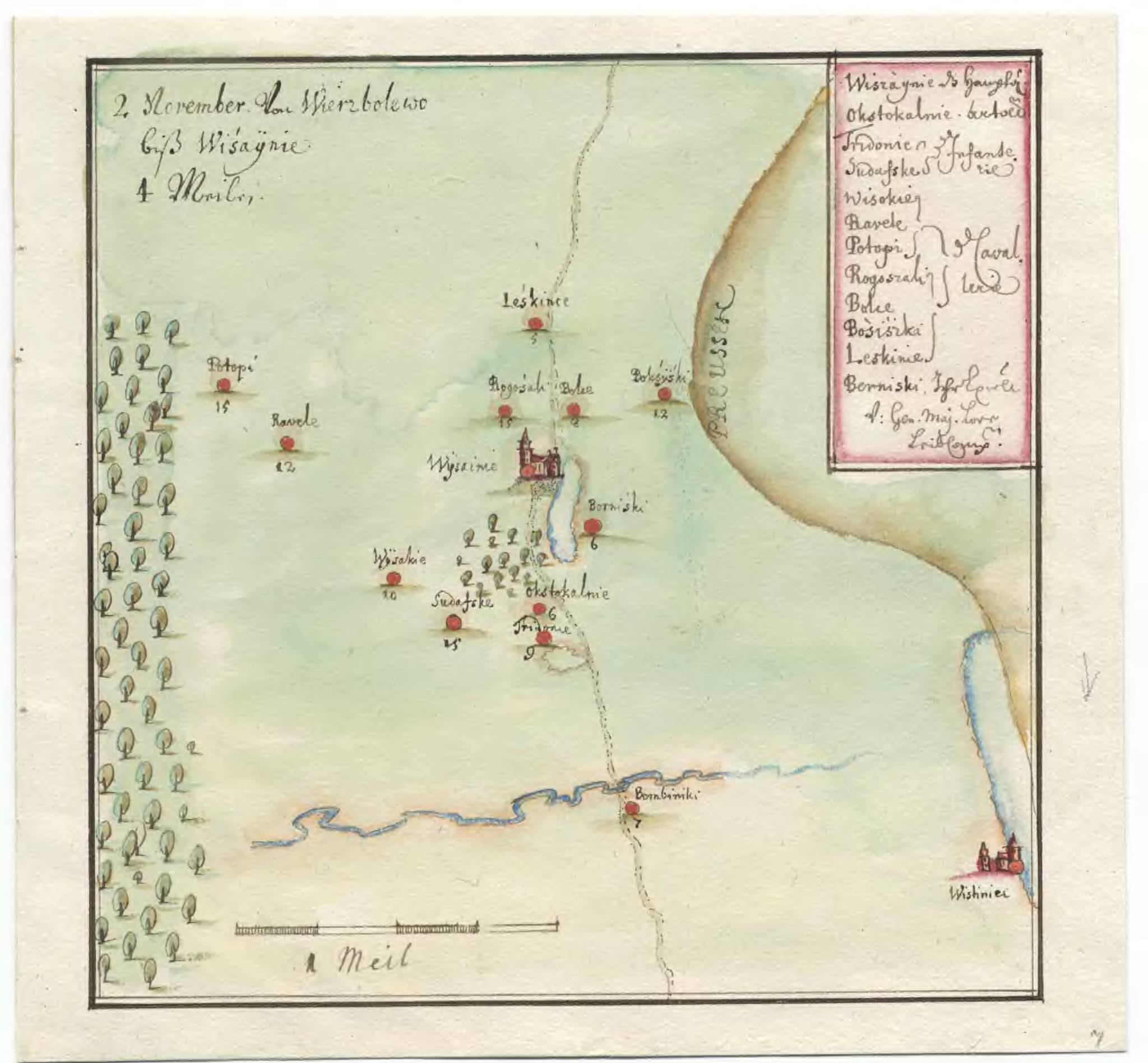 Беларуская (тарашкевіца): Віжайны (Vižajny). Мапа